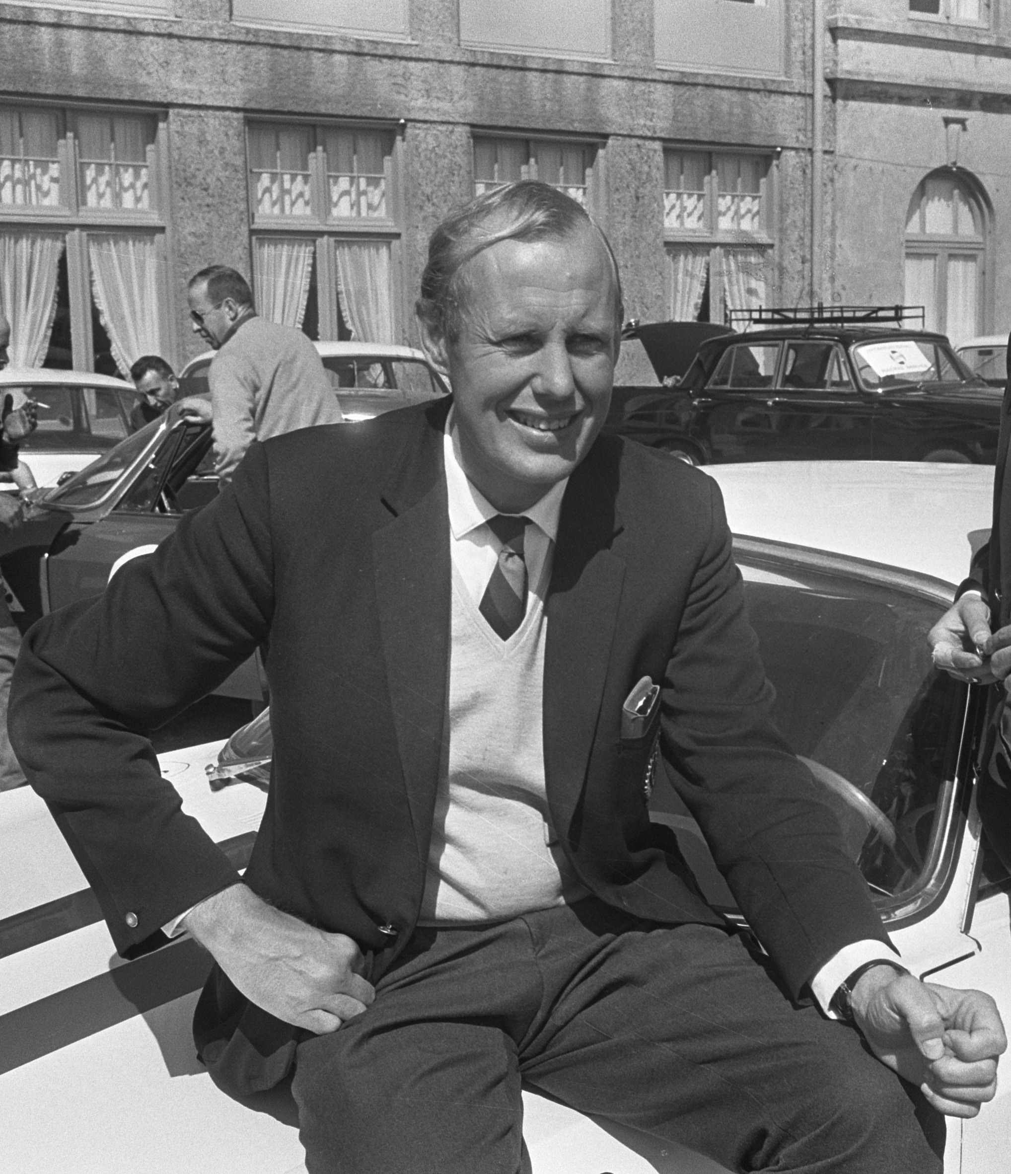 Voorbereidingen Tulpenrallye, Rob Slotemaker